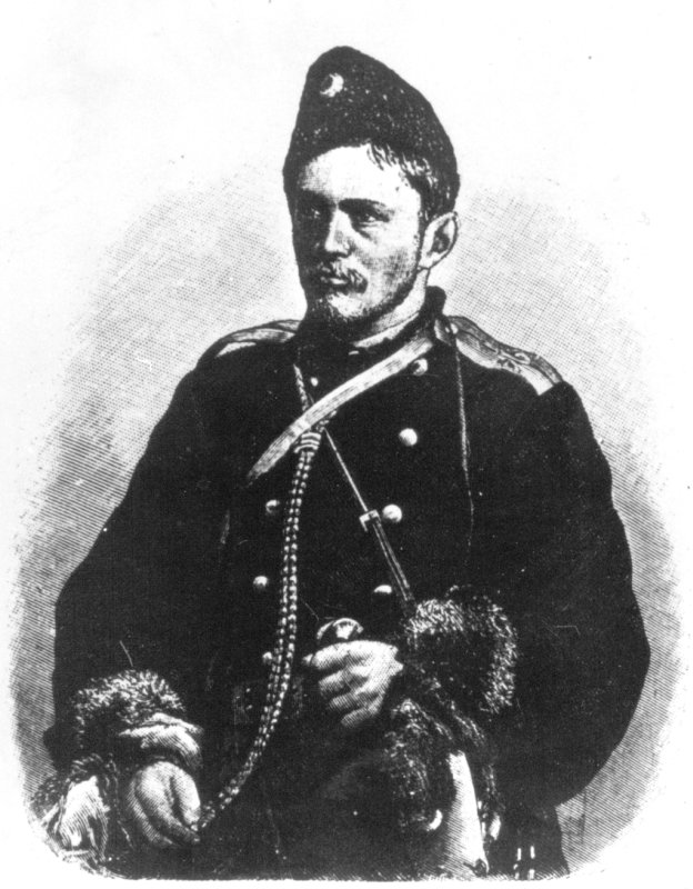 Дмитрий Николаевич Пешков, амурский казак